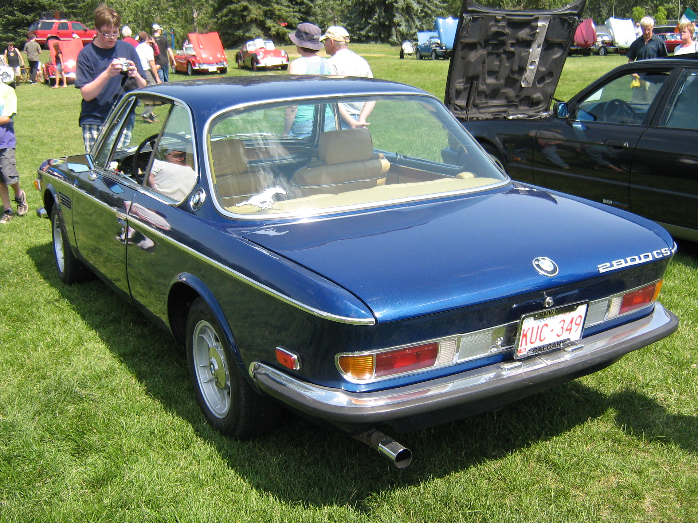 BMW 2800 CS